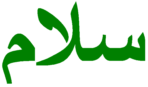 Salaam written in Arabic